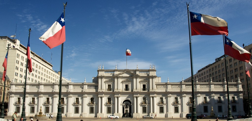 Palacio de La Moneda, sede de gobierno de Chile.